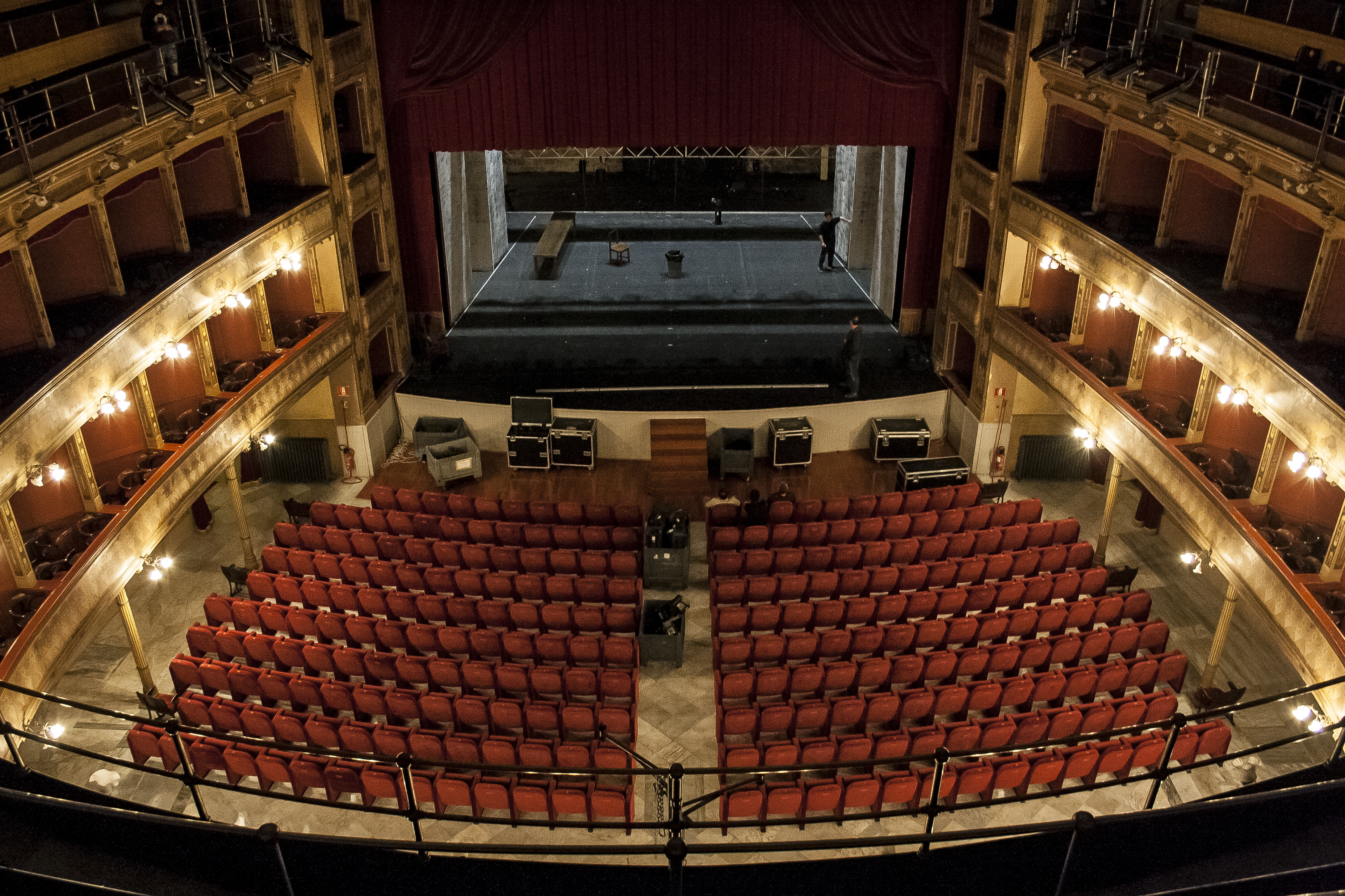 Teater Biondo, Parlermo. Parterre